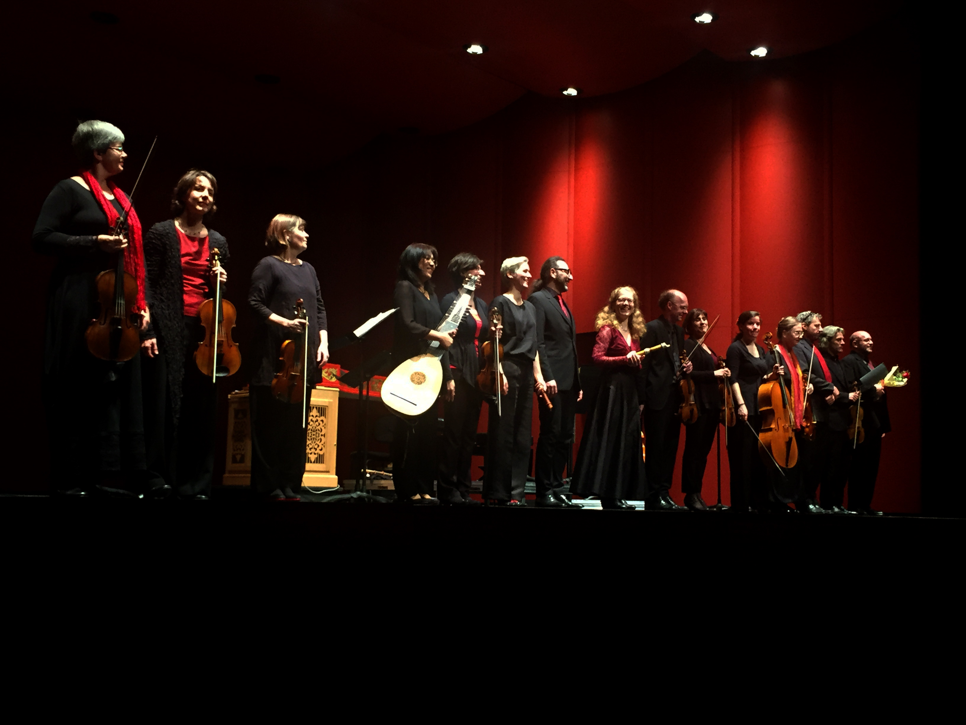 L'orquestra Akademie für Alte Musik Berlin al teatre l'Atlàntida de Vic.